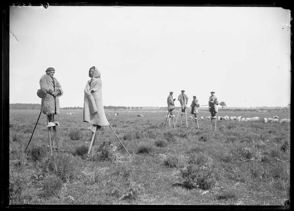 reproduction d'une plaque de verre, matièreː verre, techniqueː négatif